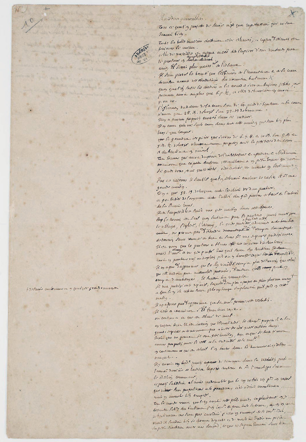 Mémoire sur les travaux de Versailles, adressé à Louis XIV en 1665 par Jean Baptiste Colbert, contrôleur général, où celui-ci exprime son hostilité à tout projet de quelque ampleur, première page.